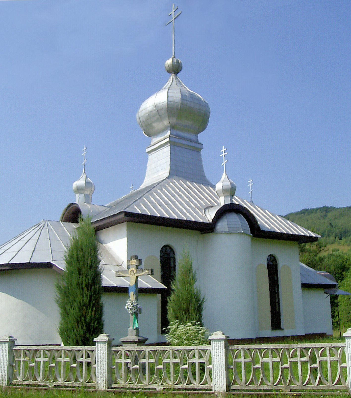 Výrava, pravoslávny kostol